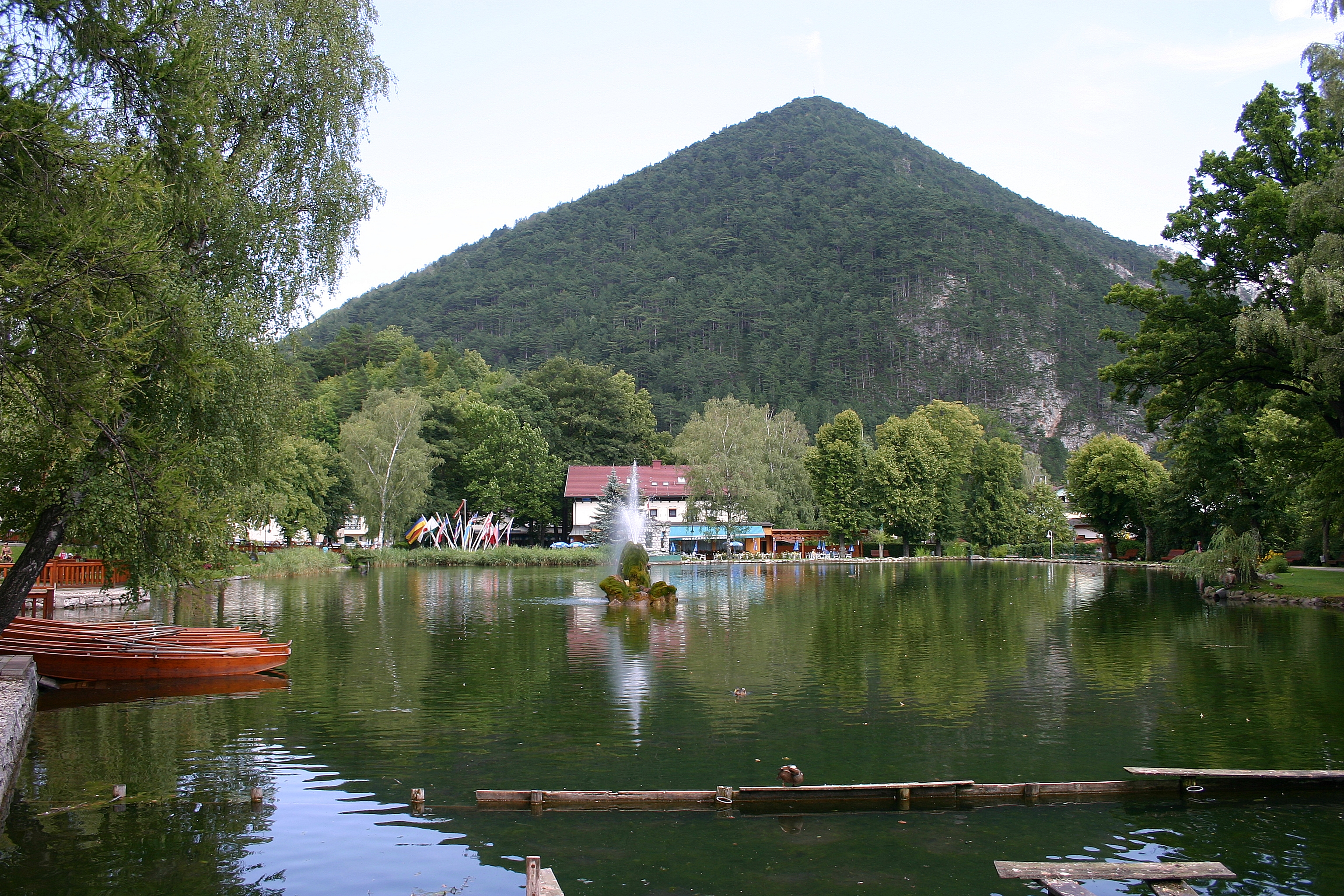 Puchberg am Schneeberg Kurpark (Bild 2)